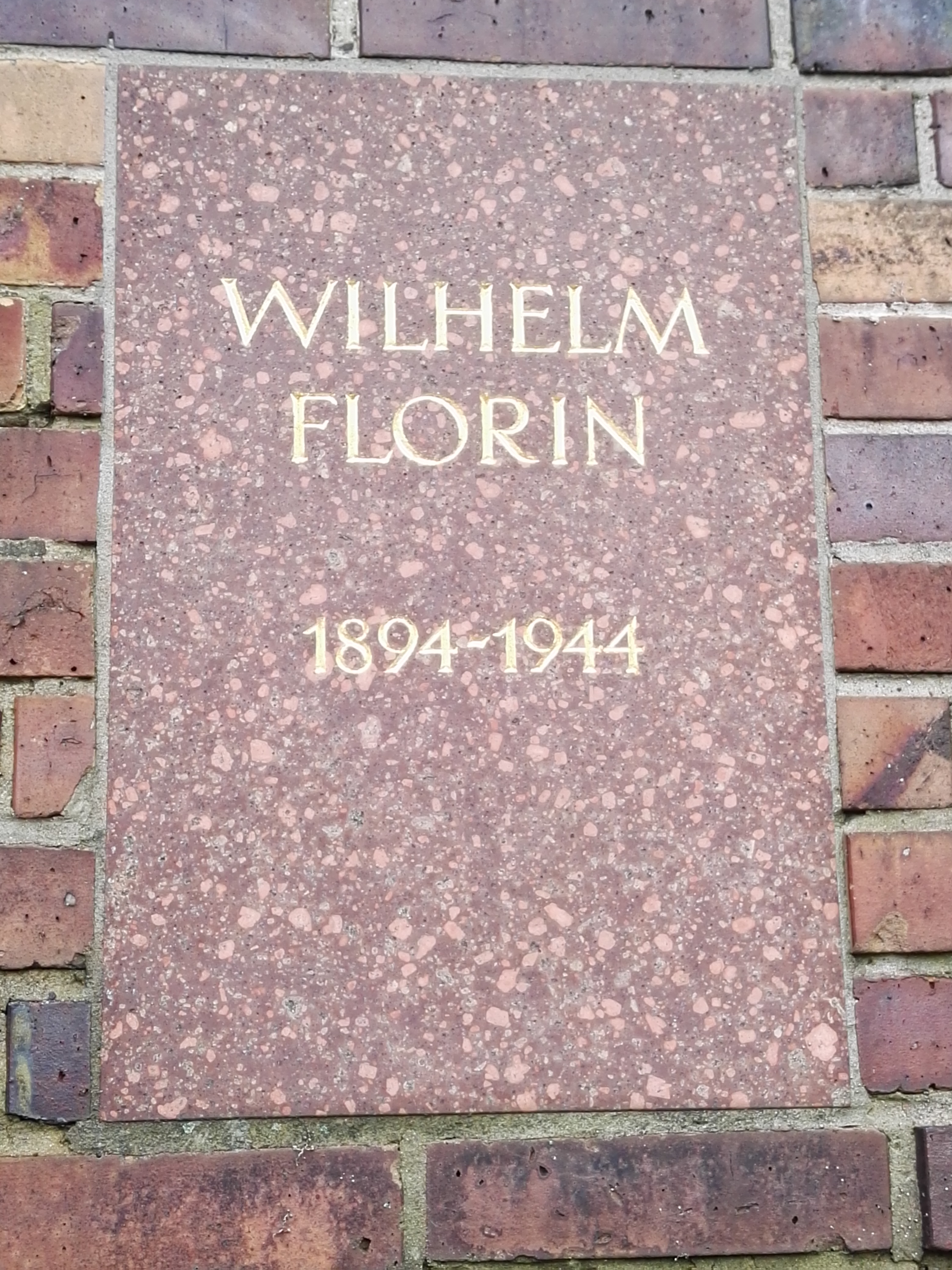 Grab von Wilhelm Florin in der Gedenkstätte der Sozialisten auf dem Zentralfriedhof Friedrichsfelde in Berlin-Lichtenberg